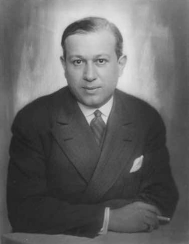 Portrait Henry E Sigerist. Fotograf: Ernst Hoenisch Leipzig.